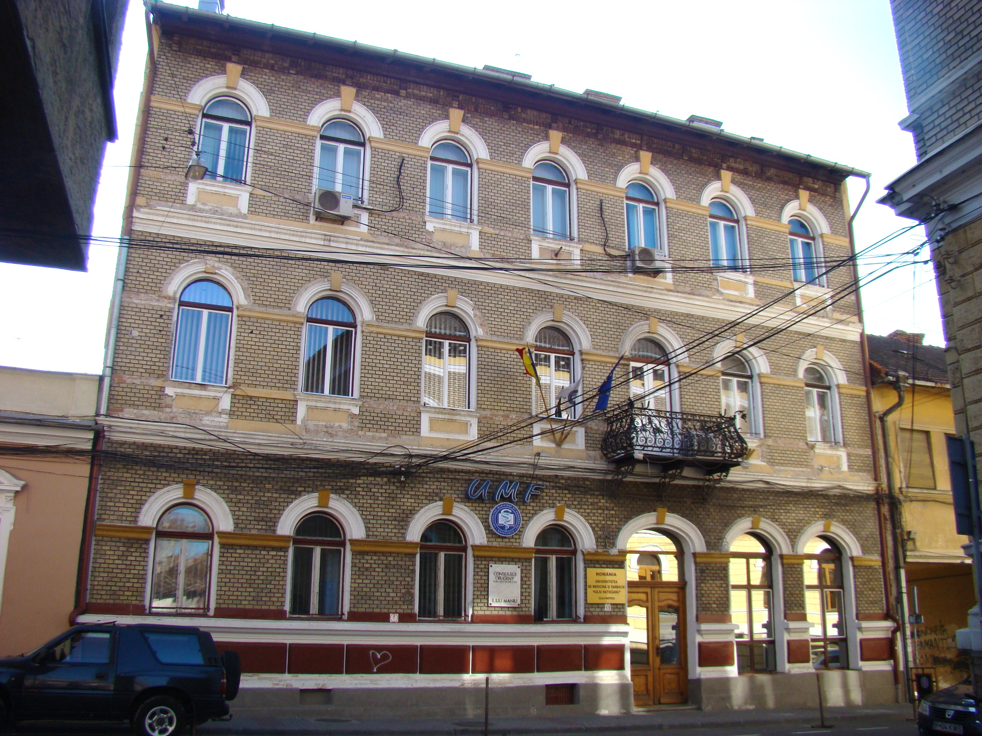 Casă Memorială-fost sediu al Consiliului Dirigent Inscriptie: " În această clădire a fost Sediul Consiliului Dirigent Toamna anului 1919-aprilie 1920 Organism românesc provizoriu de integrare a Transilvaniei după Marea Unire în cadrul Statului Național Unitar Român, avându-l ca președinte pe Iuliu Maniu 9 decembrie 1994"